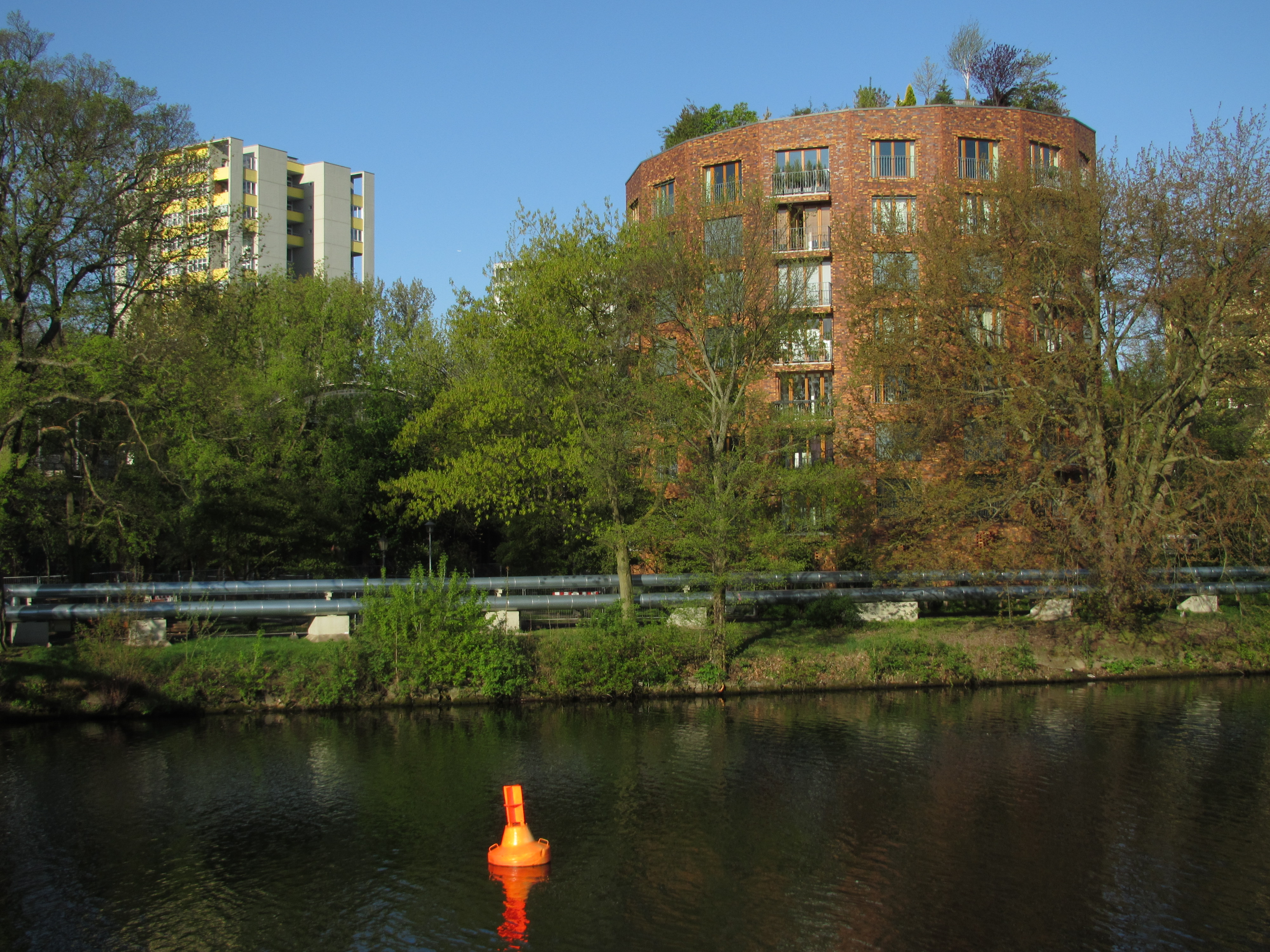 Häuser im Hansaviertel in Berlin